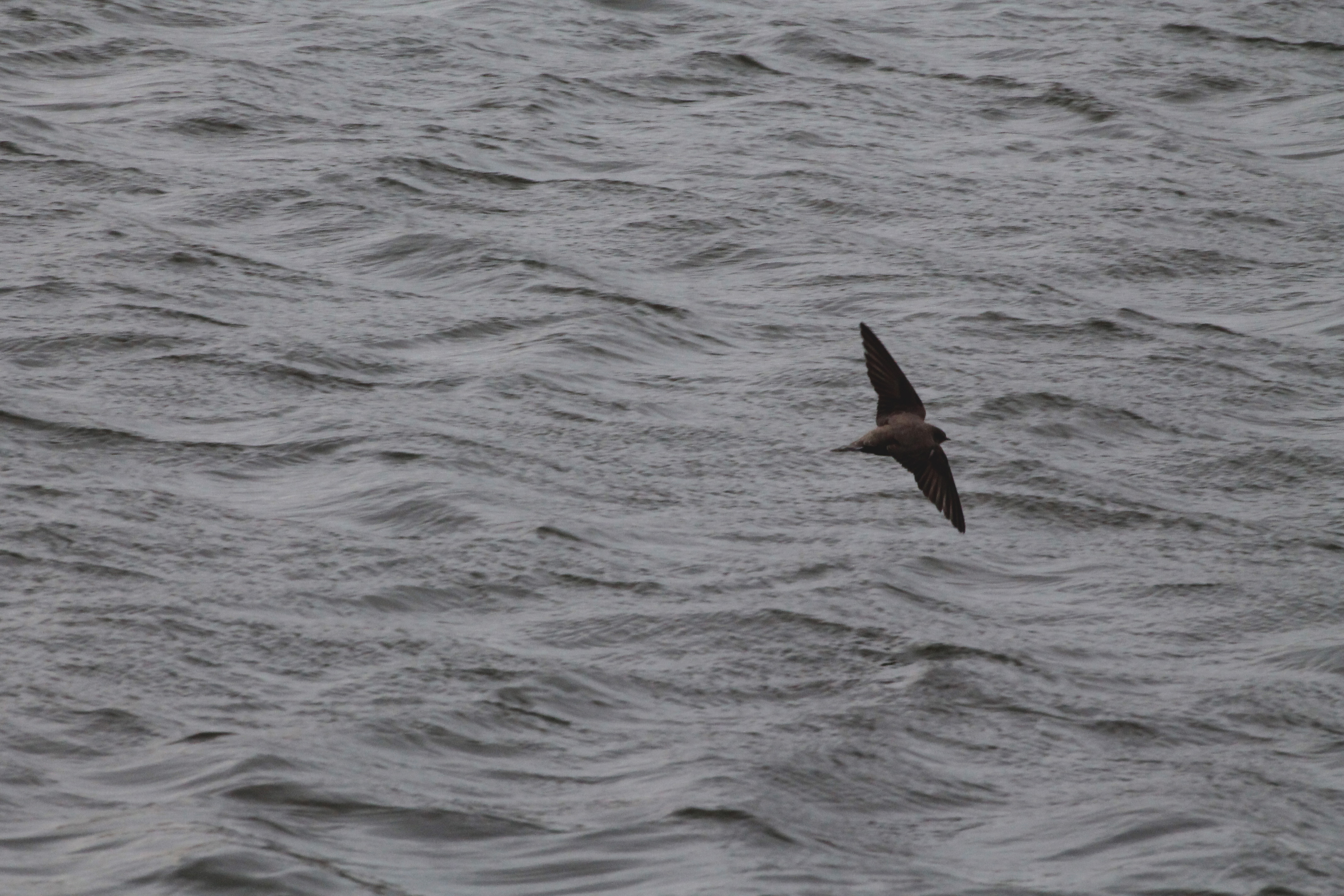 Sèquia Major This is a photography of a Special Area of Conservation in Spain with the ID: ES5140004. Natura2000 entry, EEA entry